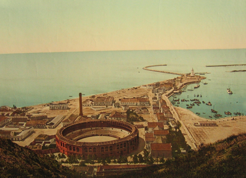 Photochrom Zurich(size: 17*22cm): 15497. P.Z. Malaga. Plaza de Toros y Malagueta